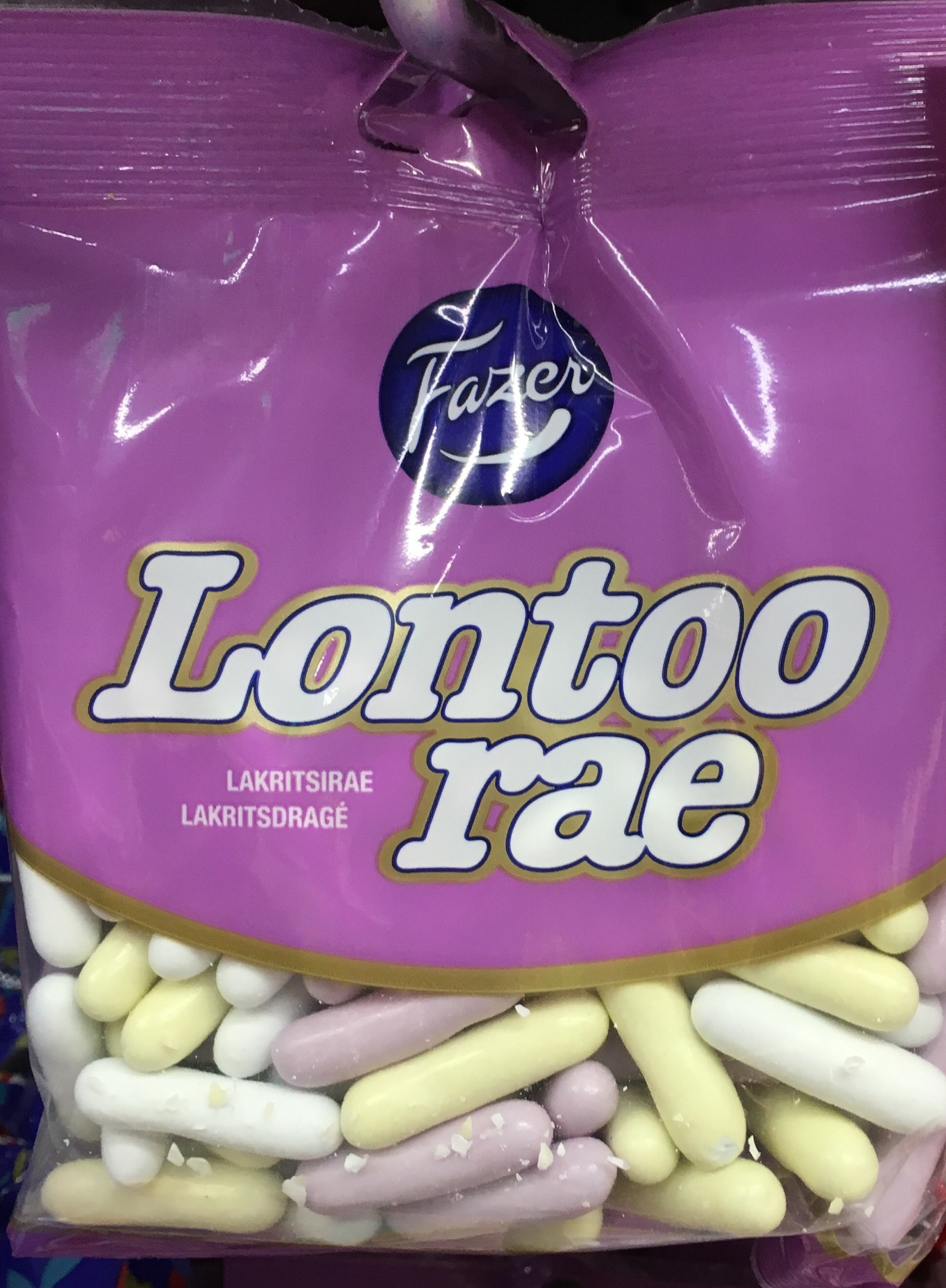 Pussillinen Lontoo rakeita